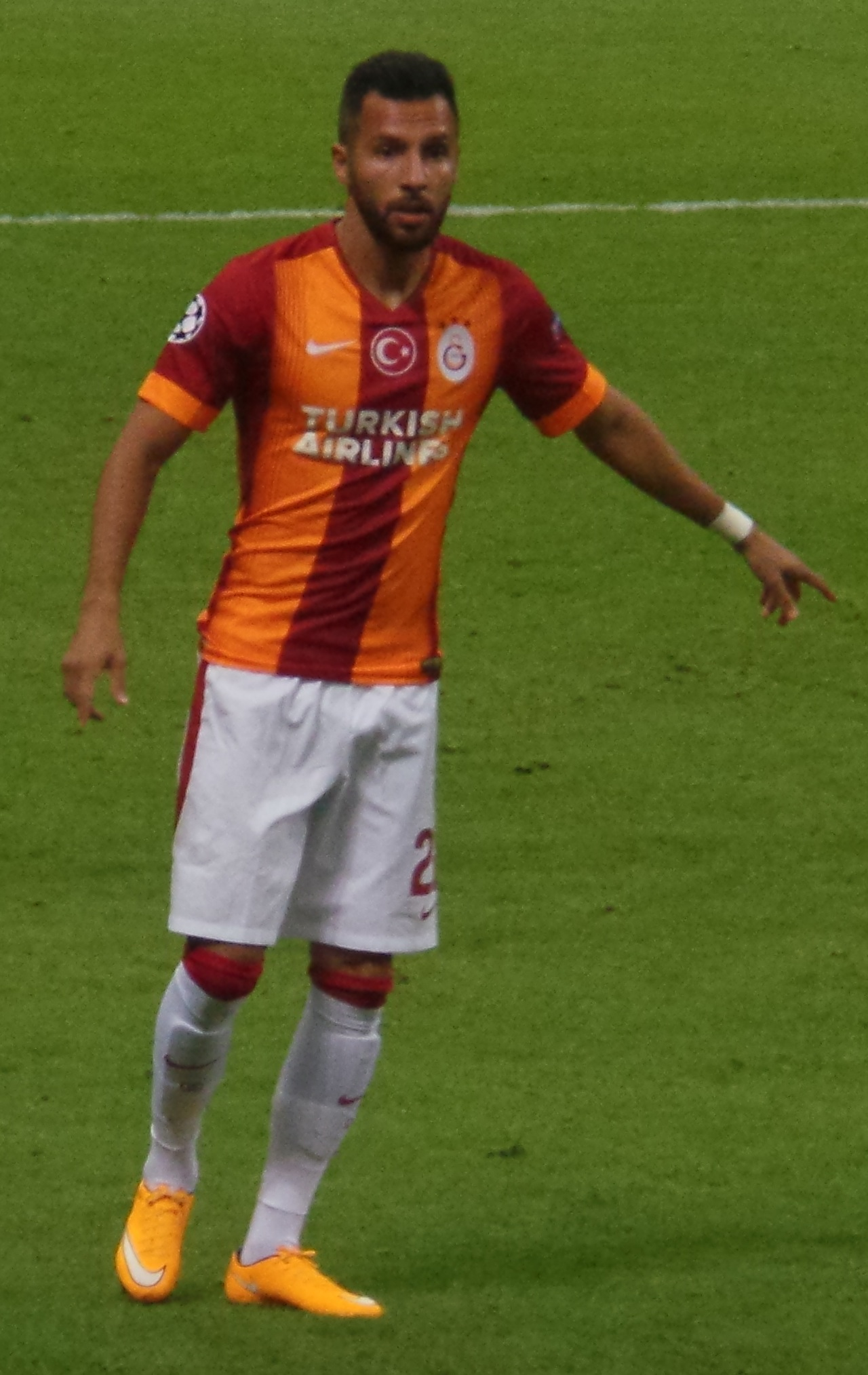 Yasin Öztekin